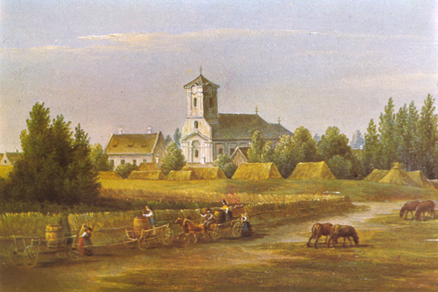 Podersdorf